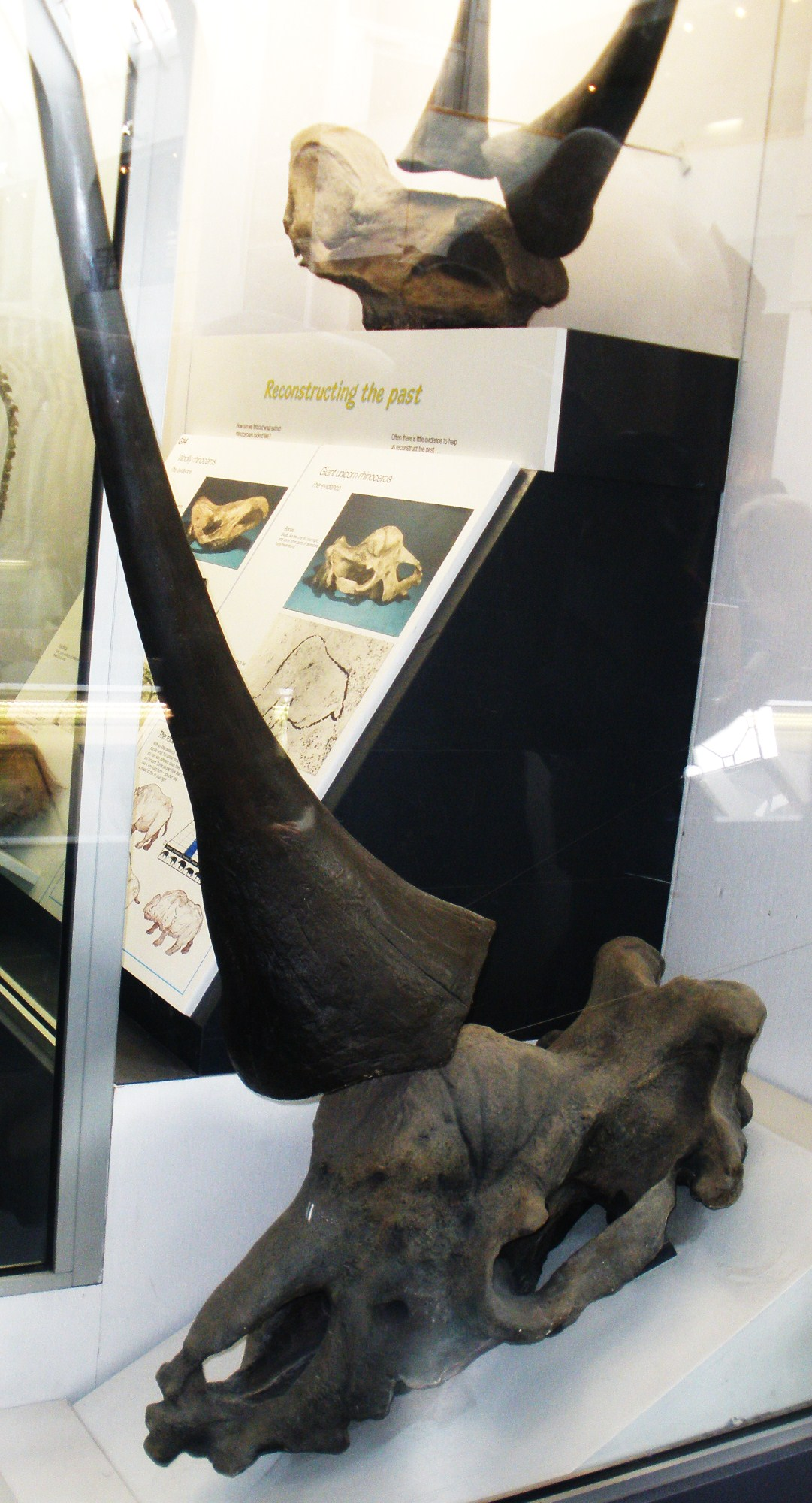 Fossil of Elasmotherium, an extinct mammal -- Took the photo at Natural History Museum, London